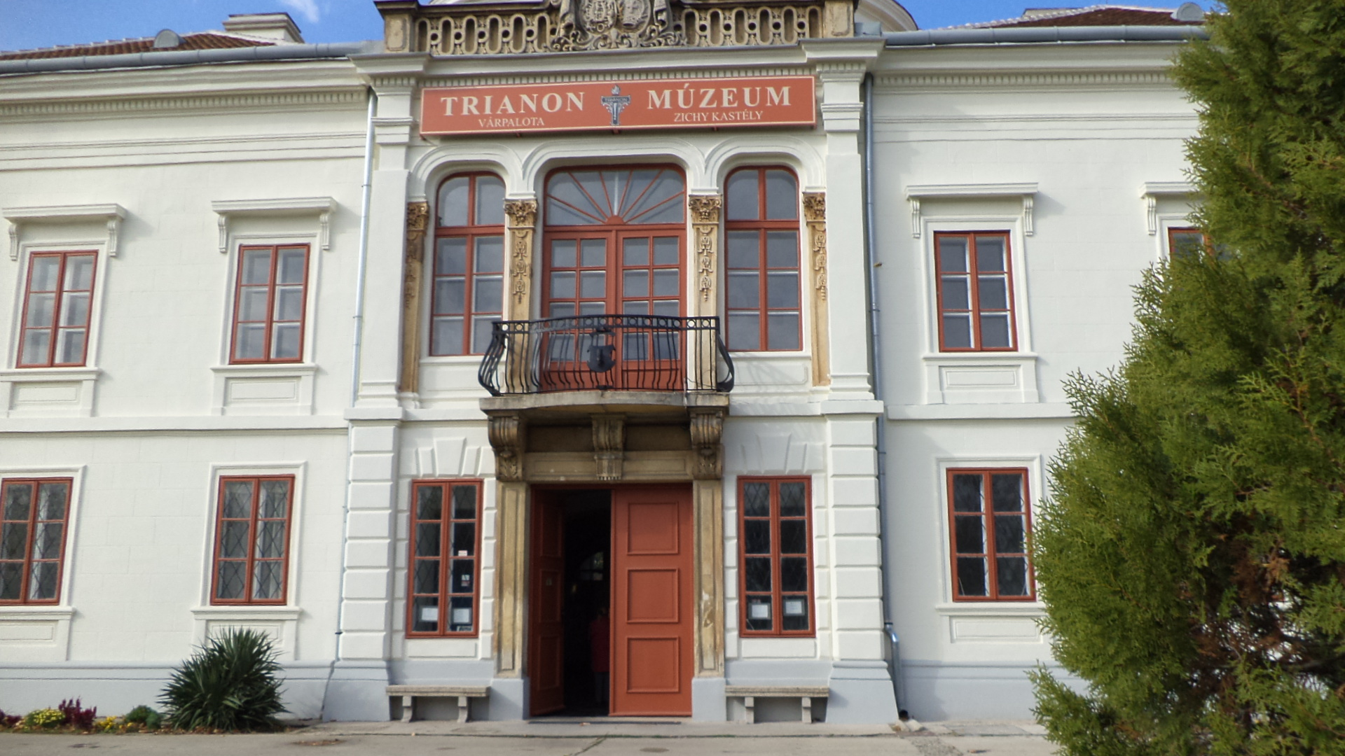 Trianon Múzeum, Várpalota